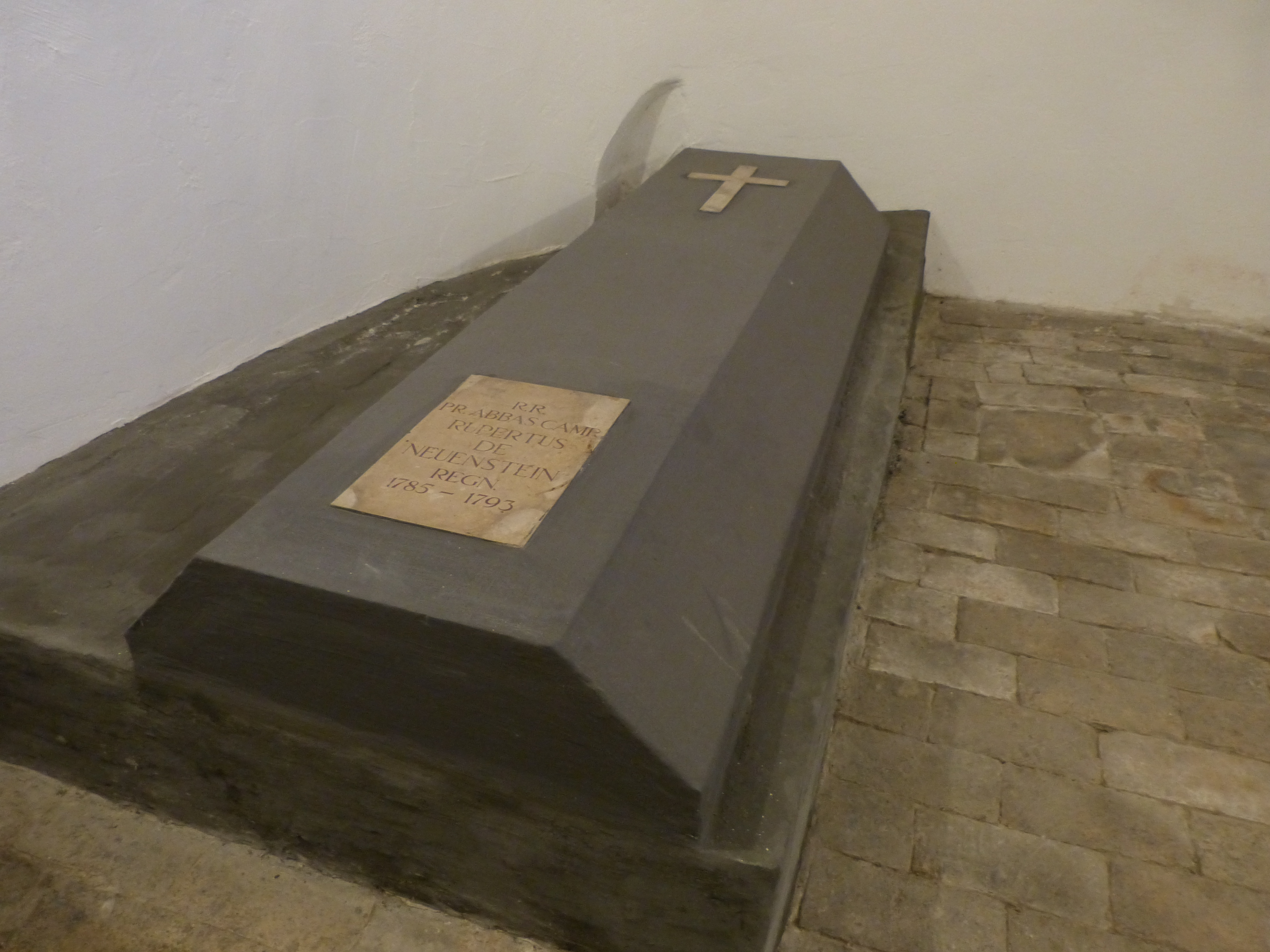 Grablege des Rupert von Neuenstein (* 16. Mai 1736 in Meßkirch; † 8. August 1793 in Marktoberdorf) in St. Lorenz Basilika, Kempten